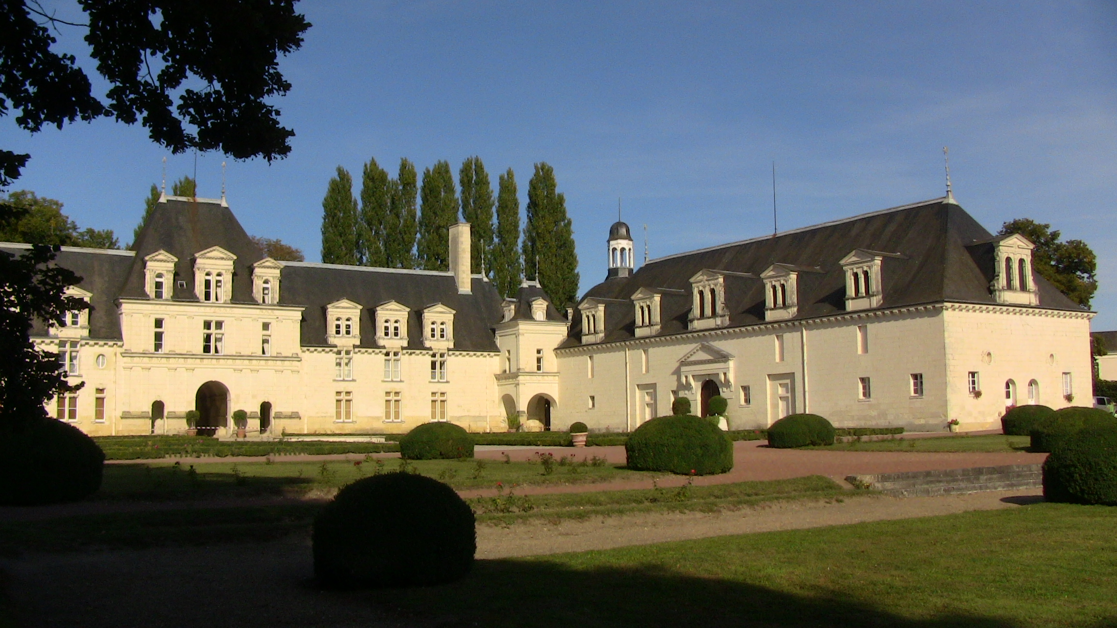 Château actuel constitué des communs, le château des Bourbon-Montpensier ayant été détruit par le Cardinal Richelieu .